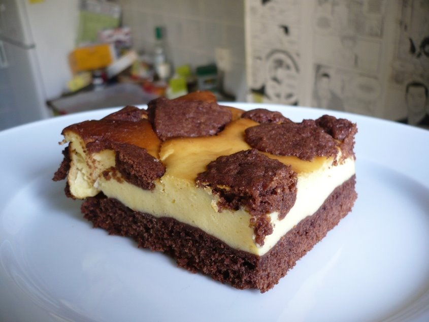 Russischer Zupfkuchen, von mir gebacken und fotografiert am 14.06.2009, veröffentlich auf